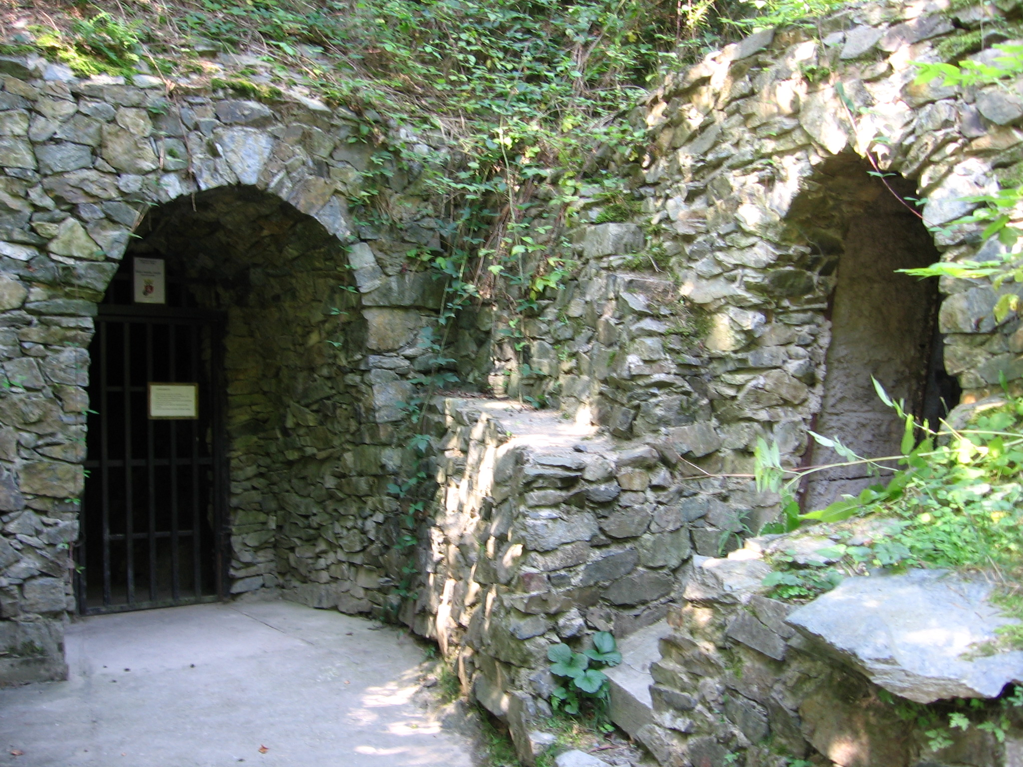 Štola sv. Josefa v Dolním Studeném - vchod